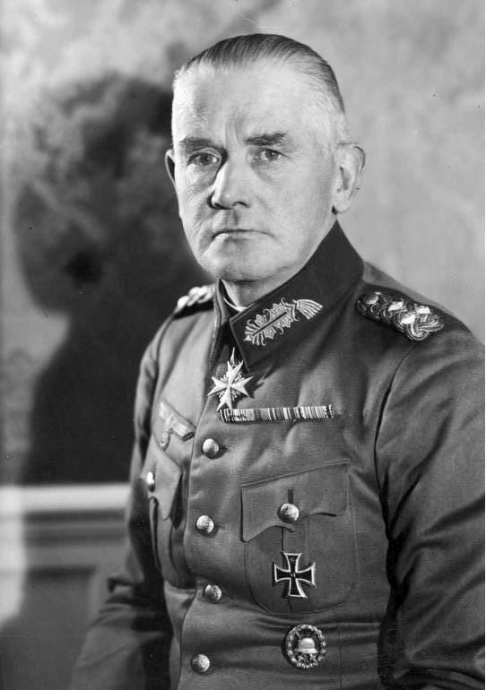 Scherl: Auf dem Foto: Blomberg in der Uniform eine Generaloberst ADN-ZB/Archiv Werner von Blomberg, Generalfeldmarschall geb.:2.9.1878 gest.:14.3.1946, seit 1935 Reichskriegsminister und Oberbefehlshaber der faschistischen deutschen Wehrmacht, 1938 von Hitler entlassen. Auf dem Foto: von Blomberg in der Uniform eines Generaloberst,Dezember 1934. Aufnahme: Presse Illustration Hoffmann